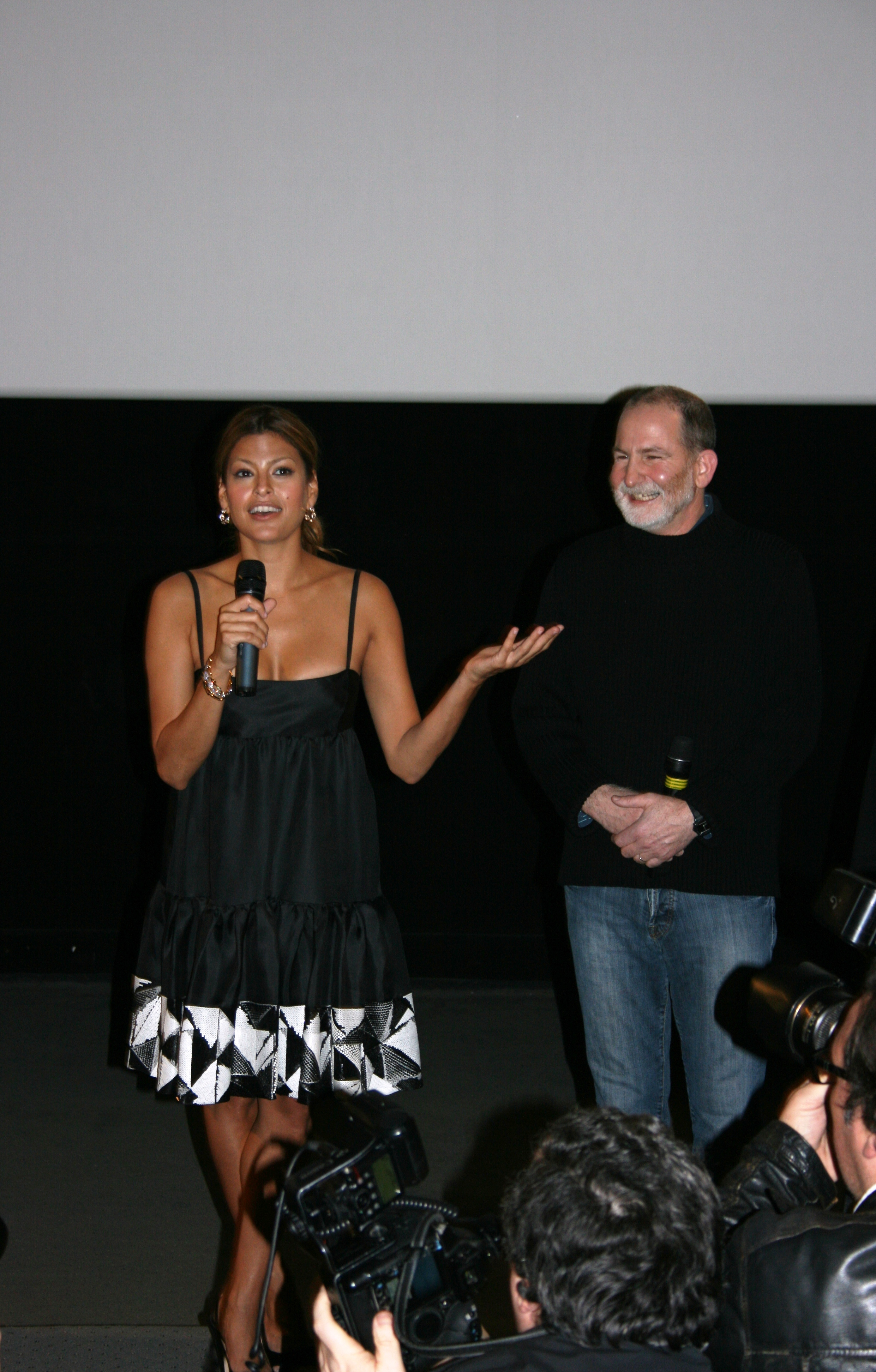 Eva Mendes et Bill Guttentag à l'avant-première de Live ! diffusée à l'UGC Ciné Cité Les Halles, à Paris.